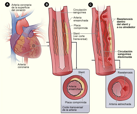 La figura A muestra las arterias coronarias de la superficie del corazón. La figura B muestra una arteria que se ha ensanchado con un stent y en la que la circulación es normal. El recuadro muestra un corte transversal de la arteria ensanchada con el stent. En la figura C se observa que con el tiempo se ha formado una cicatriz dentro del stent y a su alrededor. Esta situación causa obstrucción parcial de la arteria y circulación anormal de la sangre. El recuadro muestra un corte transversal de la formación de tejido alrededor del stent.